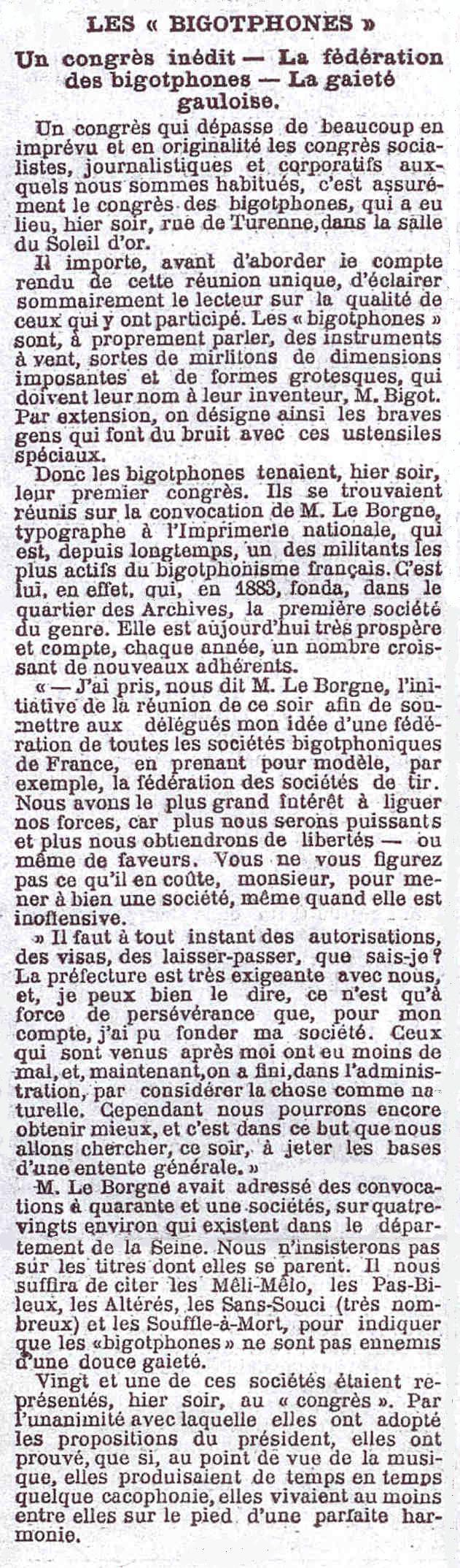 Article sur le premier congrès des bigotphones.